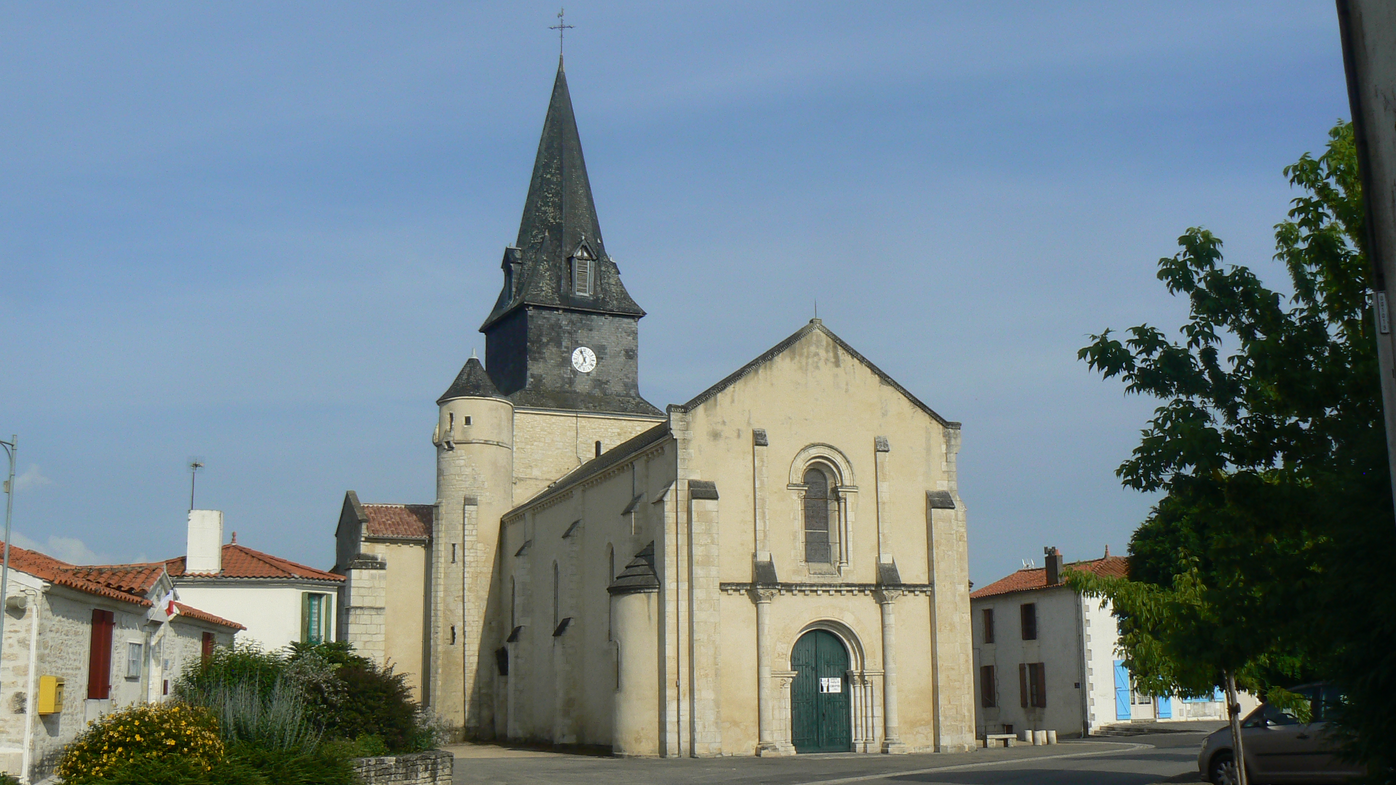 Vue depuis la rue du Logis de l’église Saint-Romain.